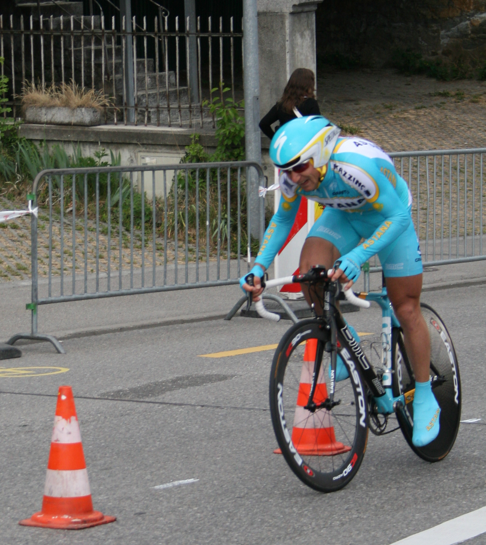 Andrey Mizourov prologue du Tour de Romandie 2007